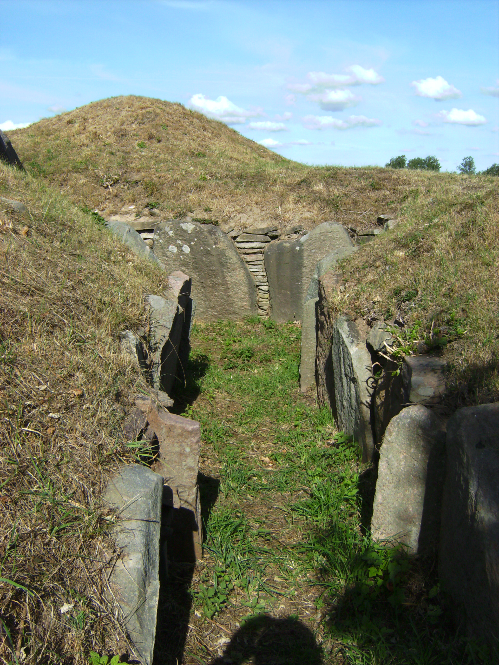 Oldtidsgrave i Kettinge Sogn nord for Nysted Dolmens in a north of Nysted, Denmark